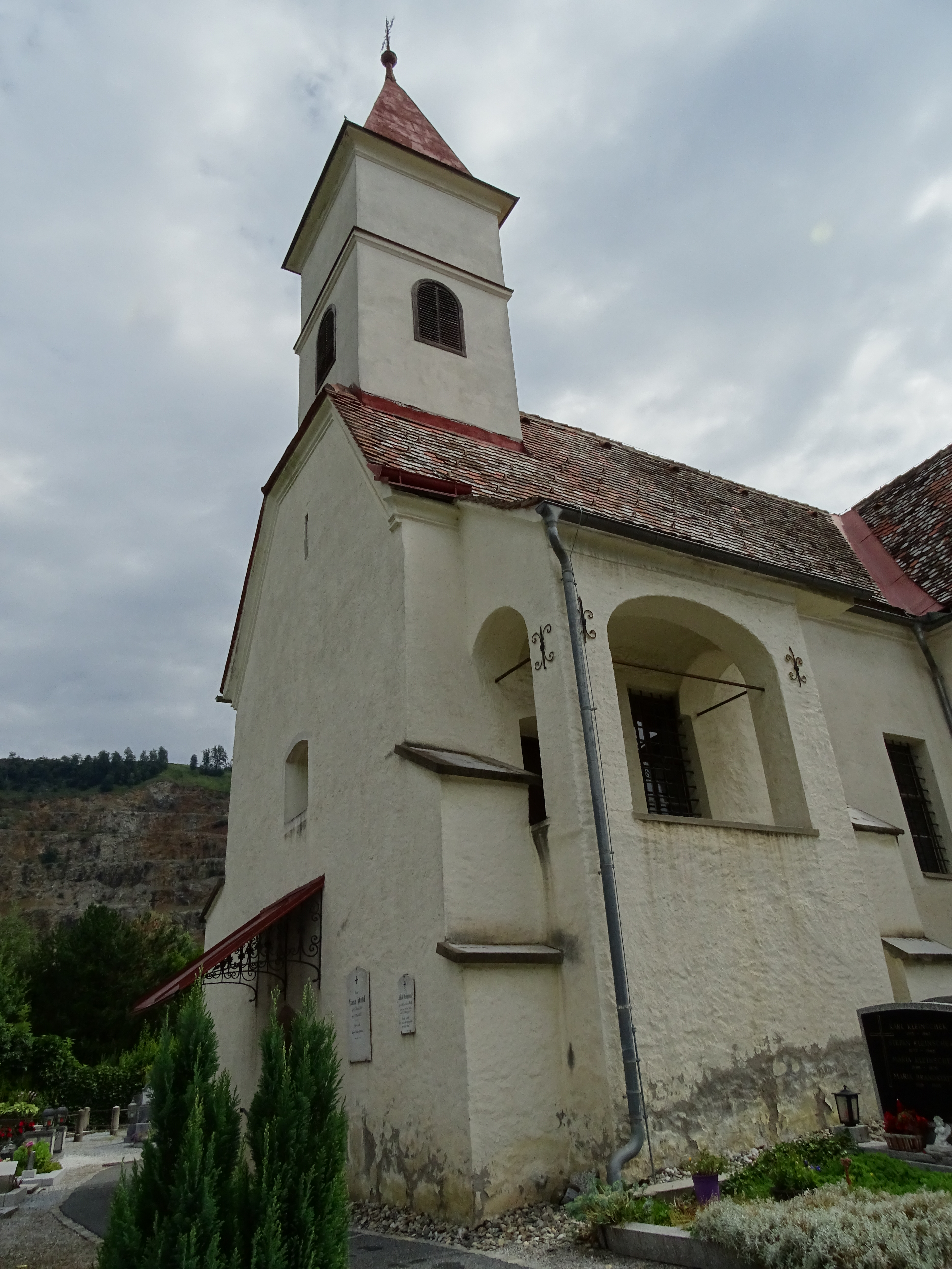 Die katholische Filialkirche in Peggau